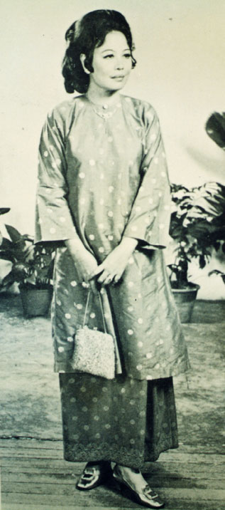 Salah satu pakaian yang dikenali di Kedah ialah Baju Kurung yang terdiri daripada baju yang longgar dan kain sarung. Kain sarung diikat ambak mengalur dan di masuk sebelah kiri atau kanan.